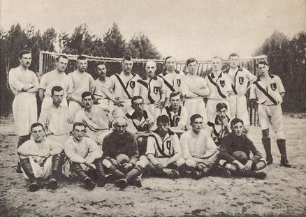 Oryginalny opis fotografii: Drużyna piłki nożnej dywizyjnego Zakładu Sanitarnego (biali) i "Legja" (oznaczeni lit. "L"). Ta ostatnia, założona w kwietniu 1916 roku przez dr. Stanisława Mielecha, najlepszy legjonowy zespół piłkarski, zaczątek dzisiejszego potężnego klubu sportowego "Legja". Zdjęcie dokonane po zwycięstwie "Legji" 7:0. Gracze "Legji", oznaczeni literą "L", stoją od lewej: Jasiński, Tyrowicz, Bednarski, Jamka, Hrabik i Smoleński. Klęczą: Knapik, Tarnawski i Uchacz. Siedzą: Mielech i Stojek (w swetrze, ostatni z prawej).